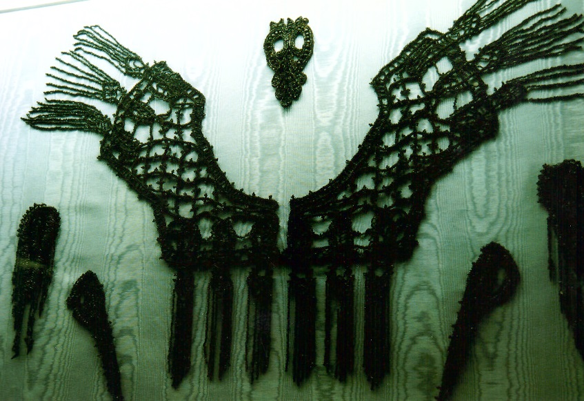 Musée du Hurepoix (Palaiseau) - collection de bijoux en jais